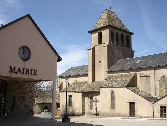 Le village d'Alrance - mairie et église Saint-Georges